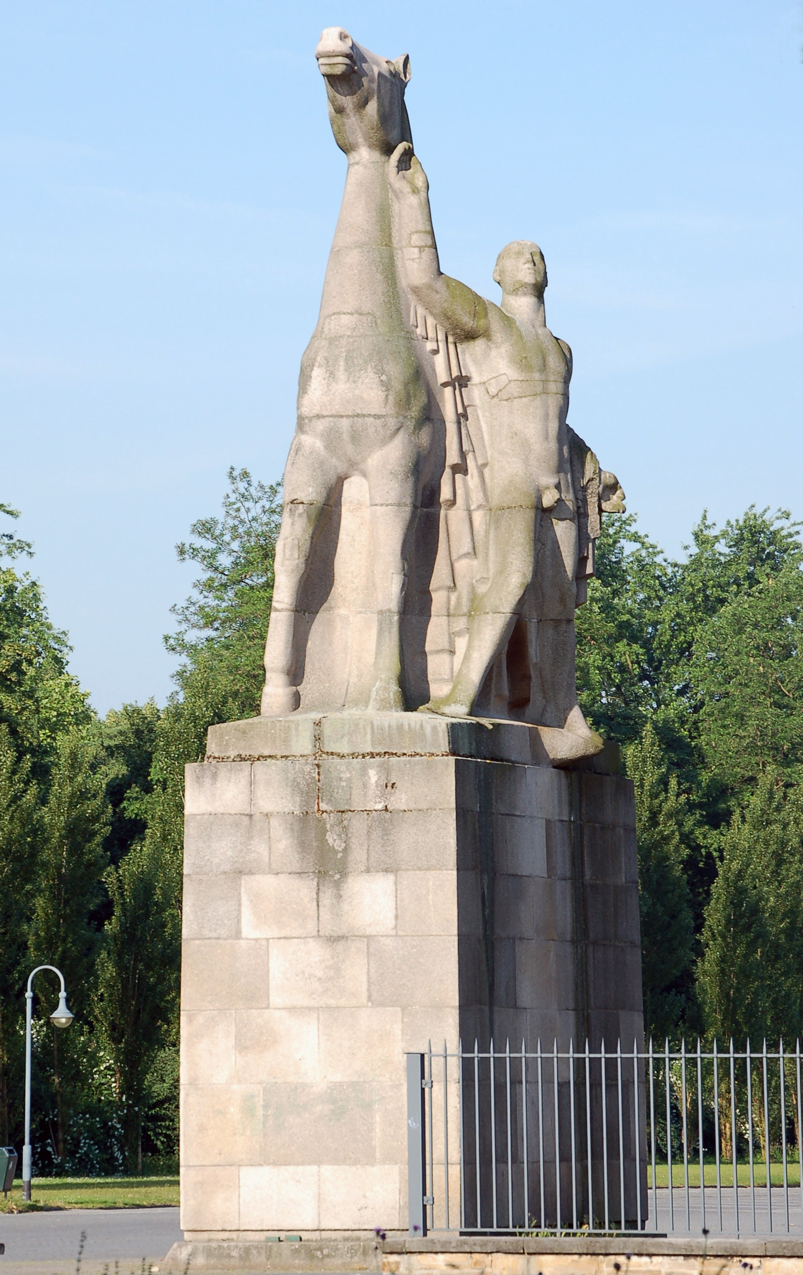 Nordpark Düsseldorf, Rechte Figur der "Rossebändiger" von Edwin Scharff